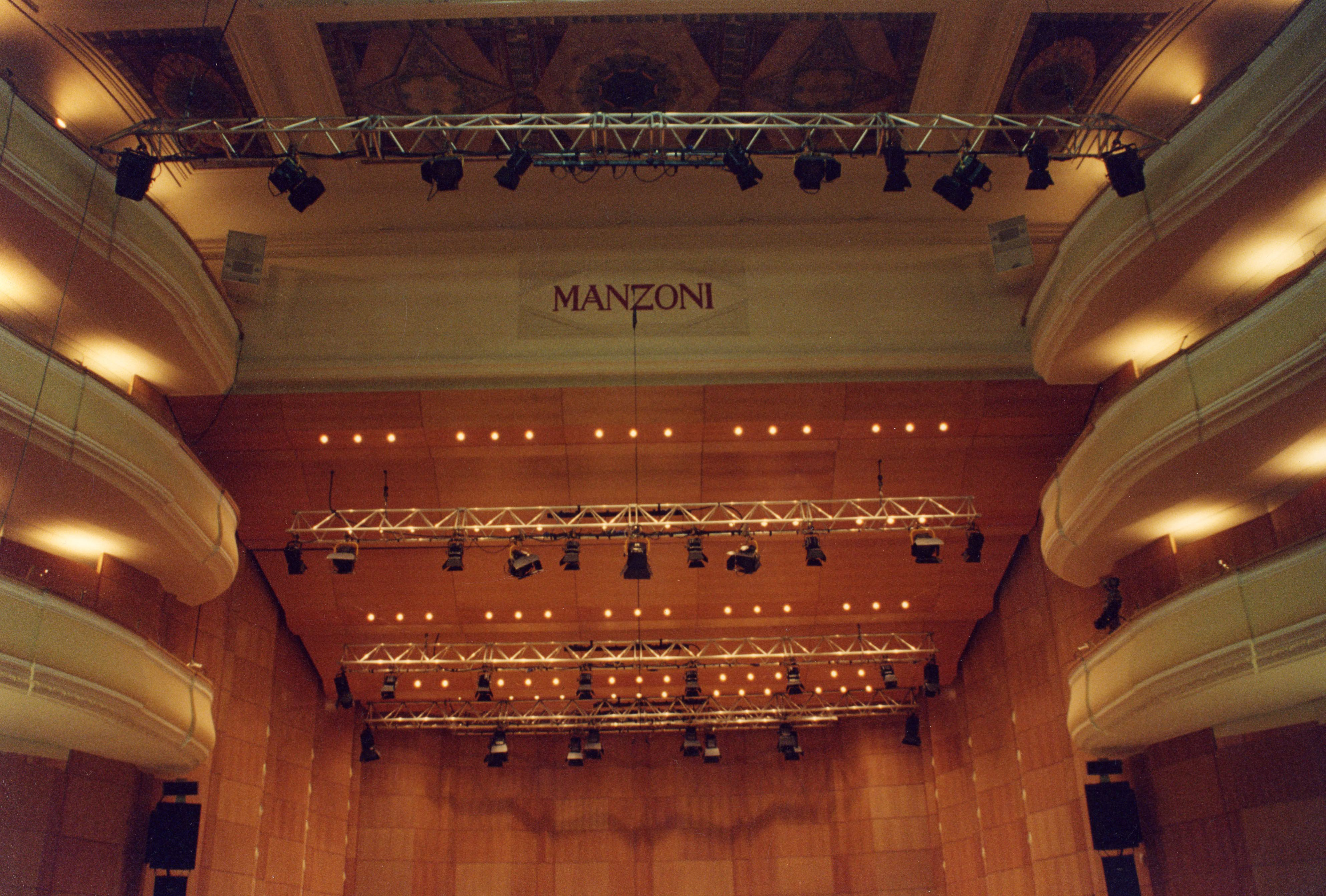 platea